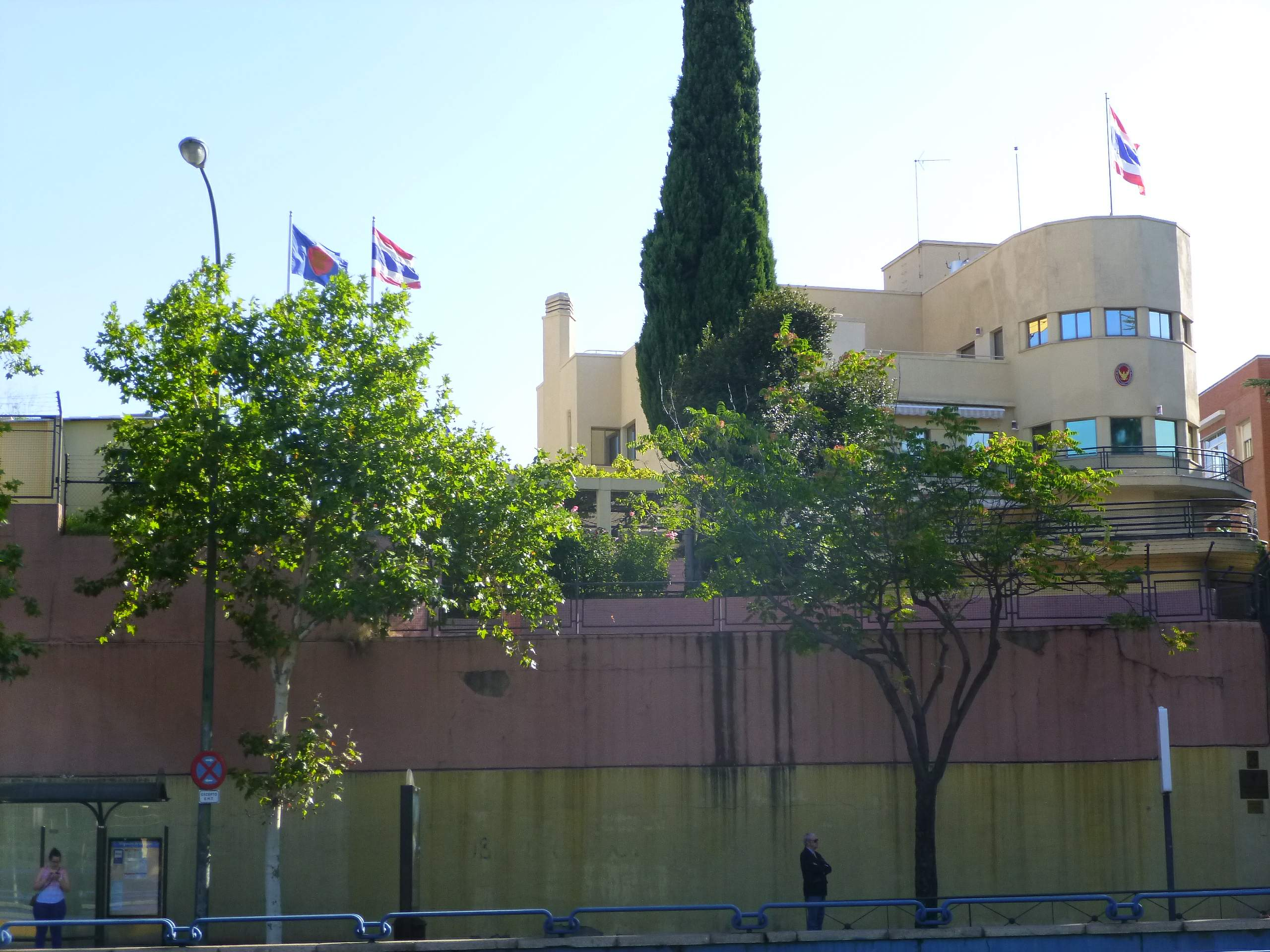 Embajada de Tailandia en Madrid